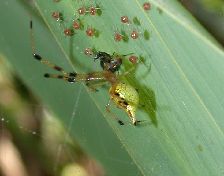 Chrysso scintillans：コガネヒメグモ 2006/08/06 和歌山県・高野山：Kouyasan, Wakayama Pref. Japan